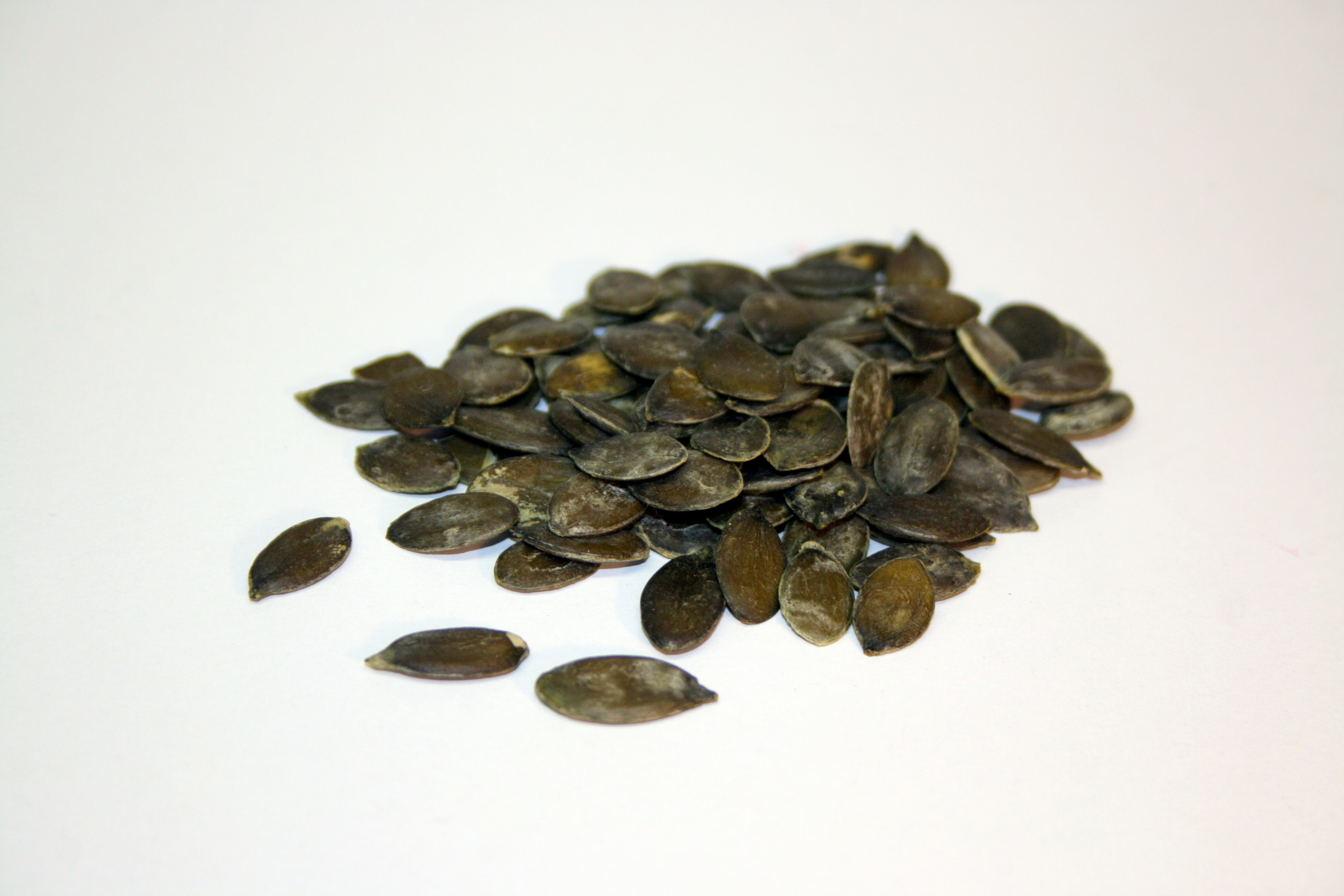 Kürbiskerne, steirischer Ölkürbis